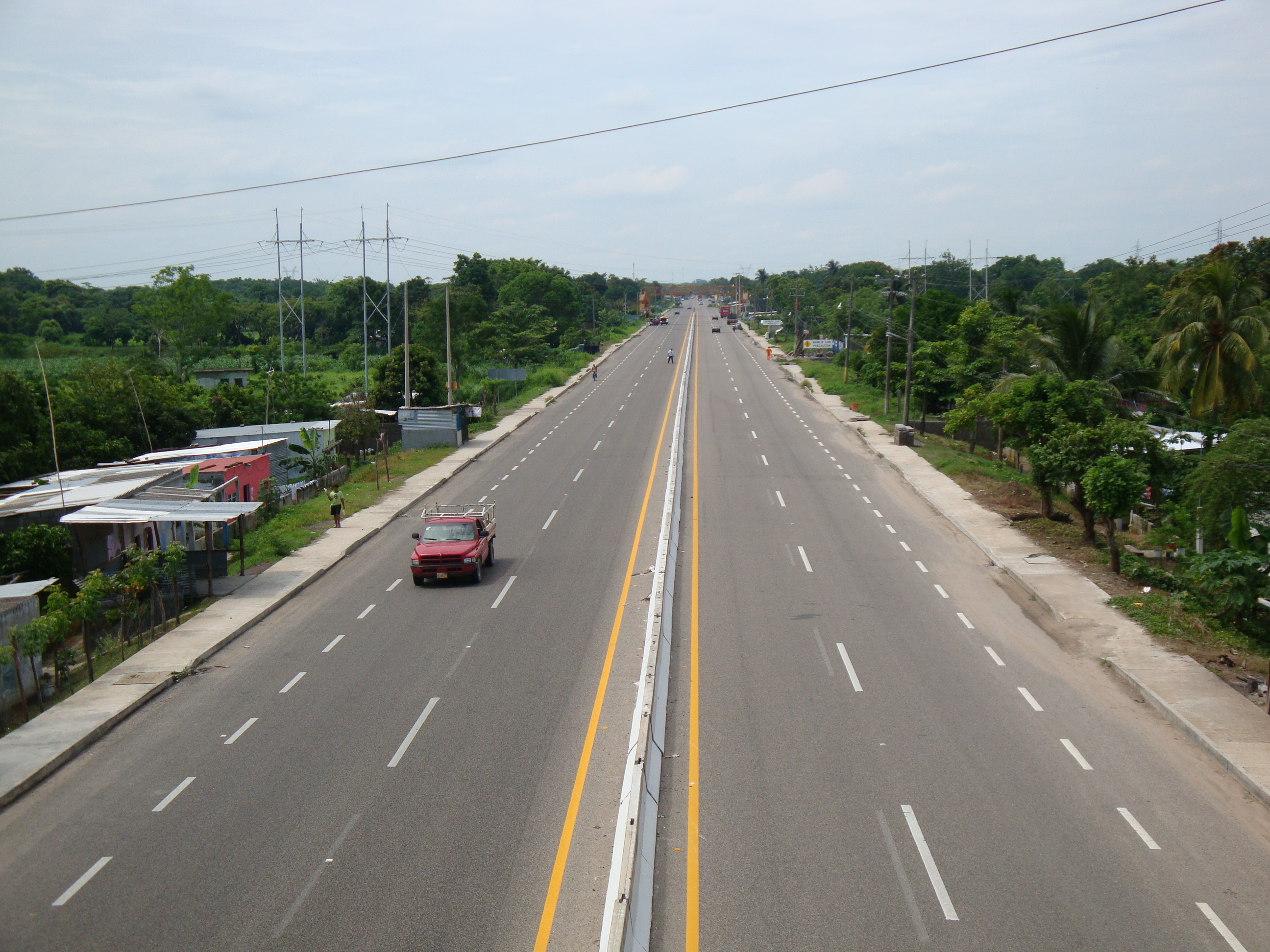 Carretera federal 187 Mal Paso-El Bellote, tramo de autopísta de 4 carriles Cárdenas-Huimanguillo, estado de Tabasco, México.